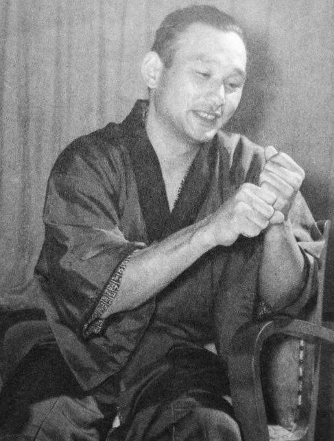 川上哲治